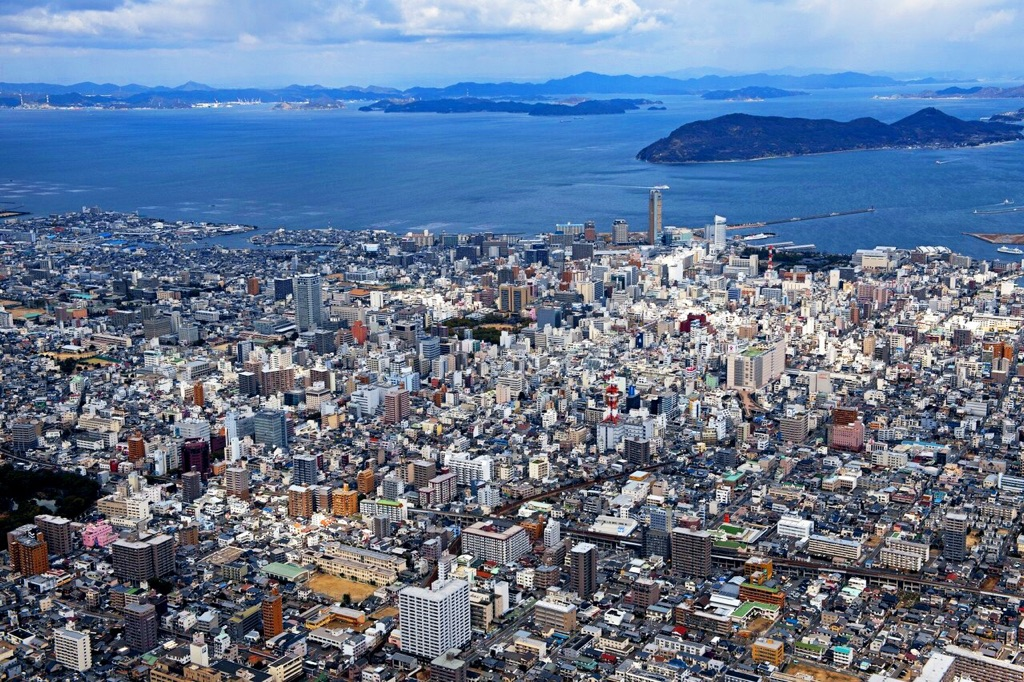 香川県の風景